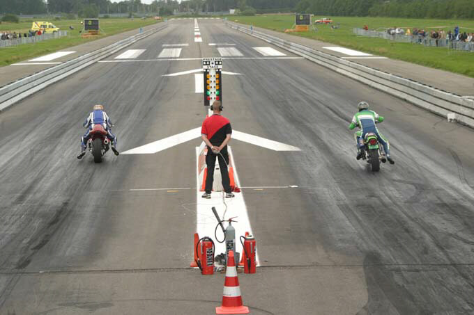 Foto met toestemming van Xavier Rincker